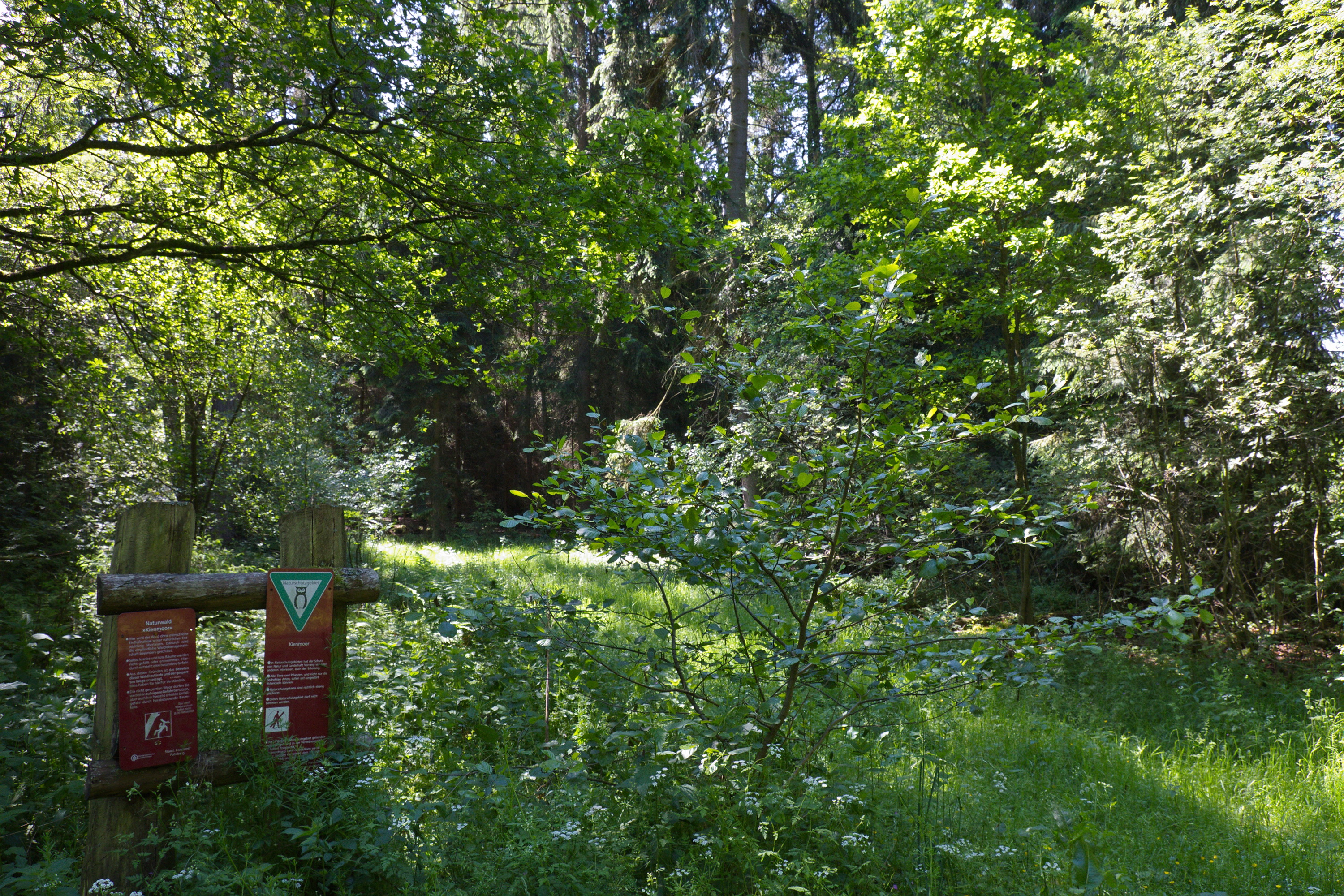 Naturschutzgebiet Kienmoor, Niedersachsen, Deutschland Zitat: "Hier wird der Wald ohne menschliche Einflußnahme seiner natürlichen Entwicklung überlassen. Dadurch wird die empfindliche Waldlebensgemeinschaft besonders geschützt. Selbst kranke und tote Bäume werden nicht gefällt oder entnommen. ..."